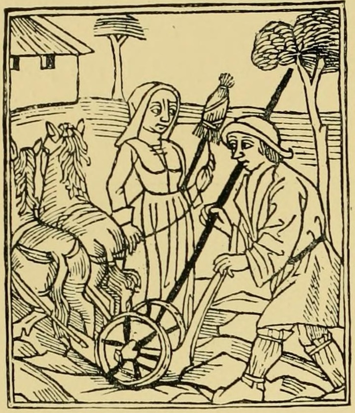 Jeanne d'Arc filant sa quenouille aux côtés de son père à la charrue. Gravure sur bois extraite d'une édition imprimée du poème de Martial d'Auvergne, Les Vigiles de la mort de Charles VII (début XVIe siècle).